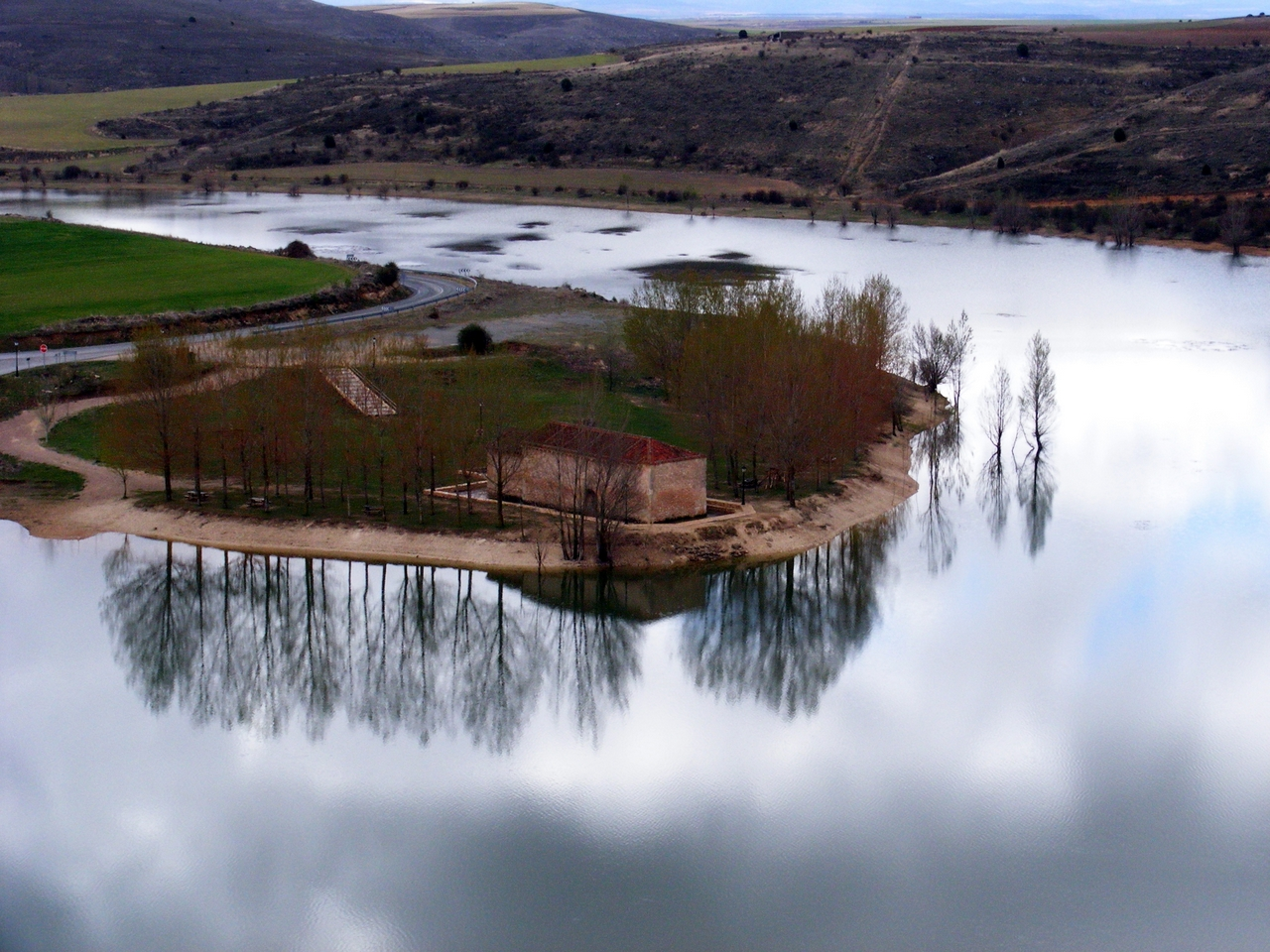 En la orilla del Embalse de Linares del Arroyo